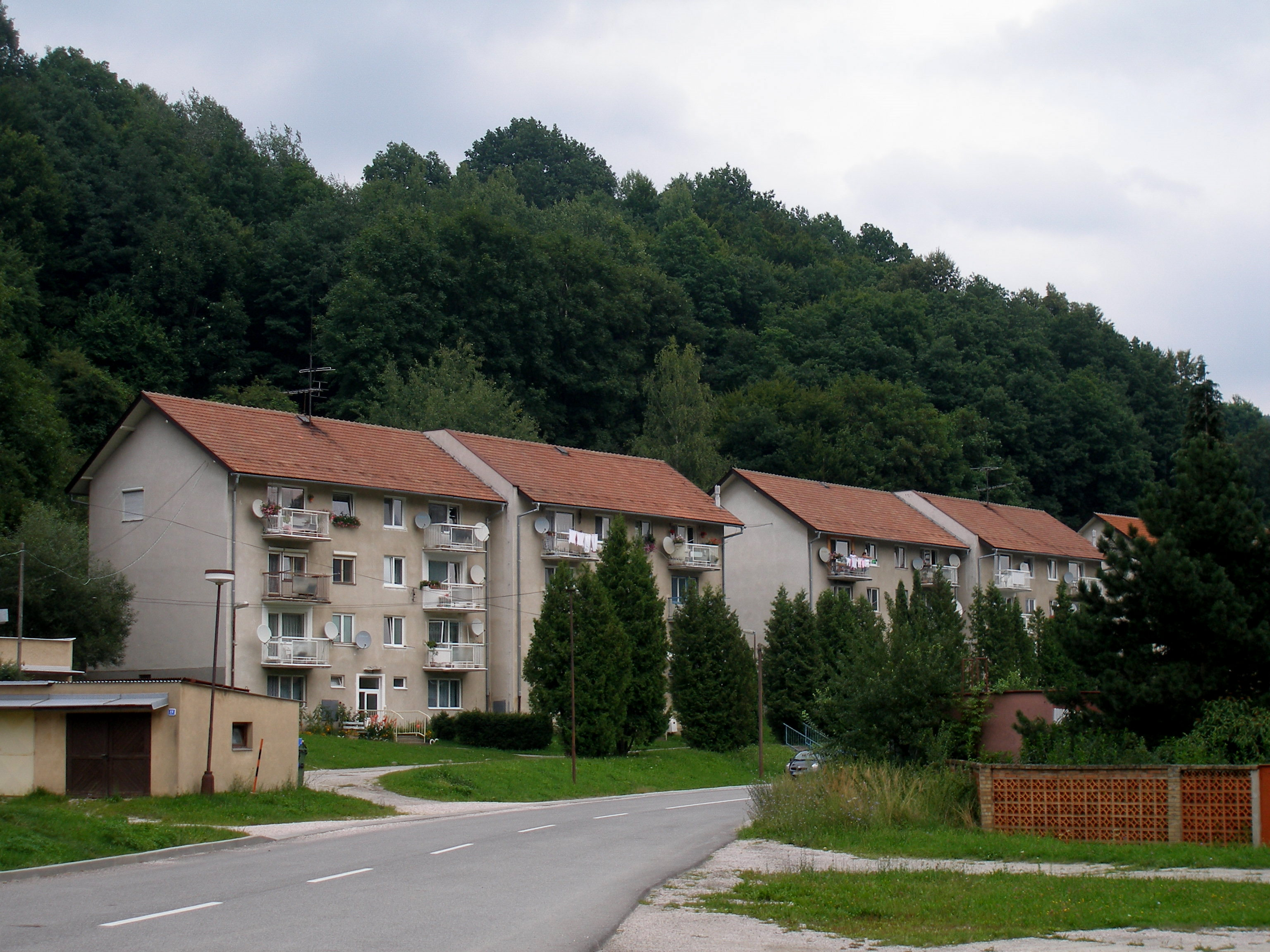 Obec Štós okres Košice okolie.